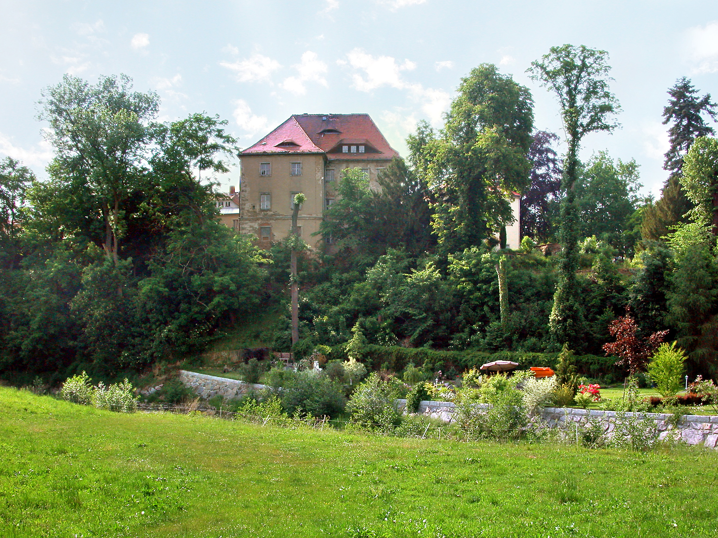 01.06.2008 01774 Klingenberg, Am Rittergut 6 (GMP: 50.917253,13.538943): Rittergut Klingenberg, Herrenhaus. Parkseite zur Wilden Weißeritz. [DSCN32940.TIF]20080601085DR.JPG(c)Blobelt